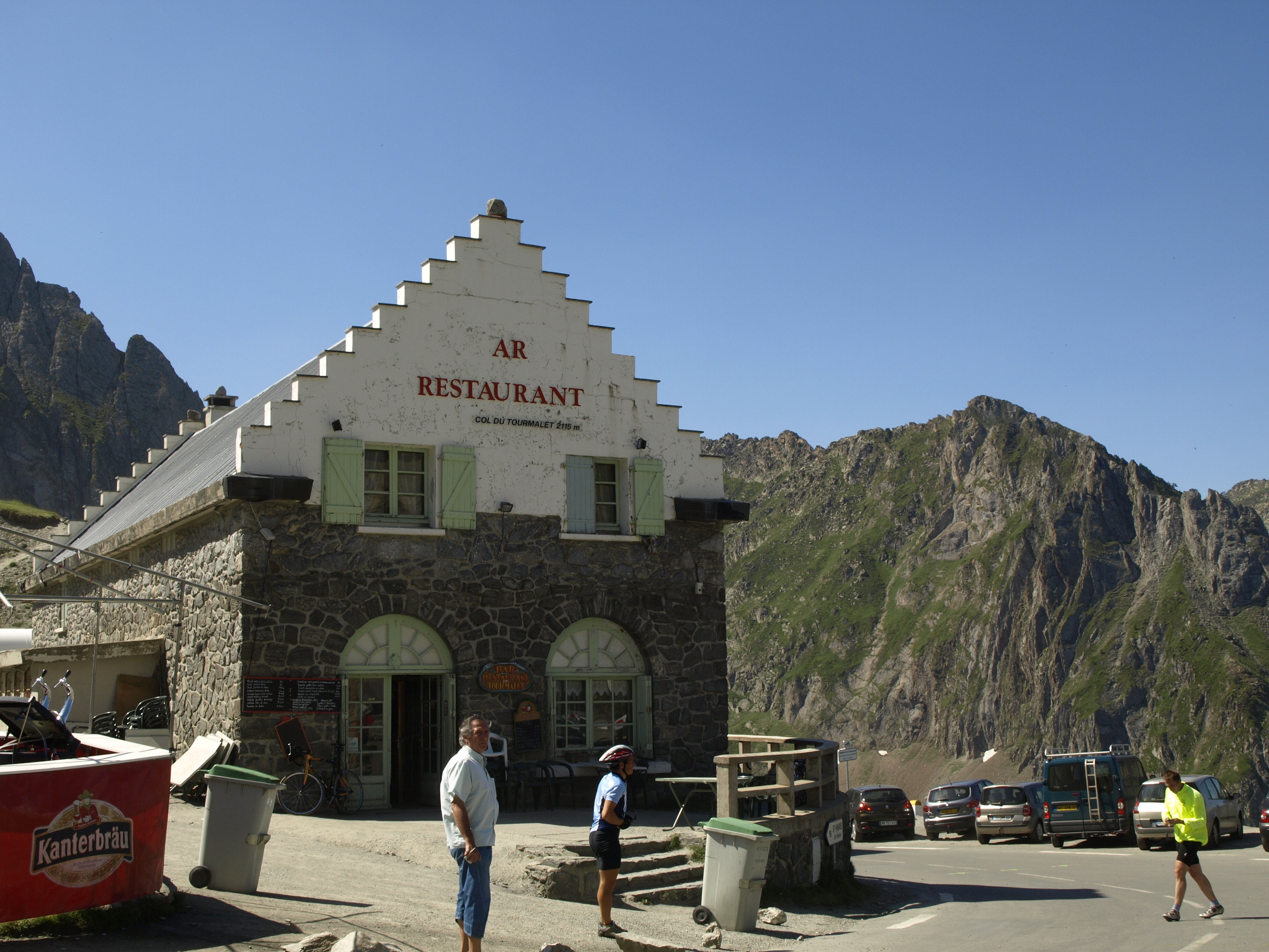 Col du Tourmalet